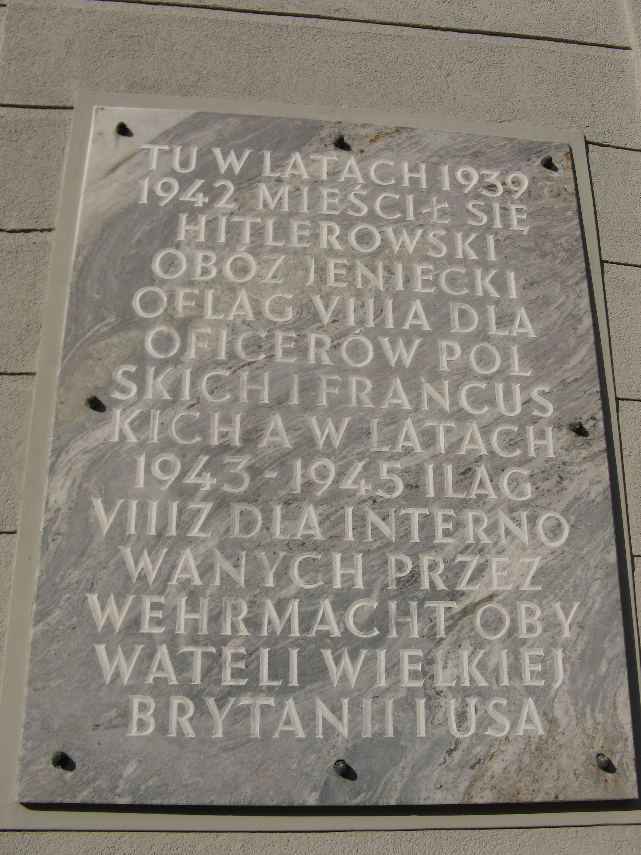 Tablica pamiątkowa przy zakładzie dla ubogich w Kluczborku. Kluczbork, ul. Zamkowa 8 (d. 15 Grudnia), Kluczbork 04.1964.